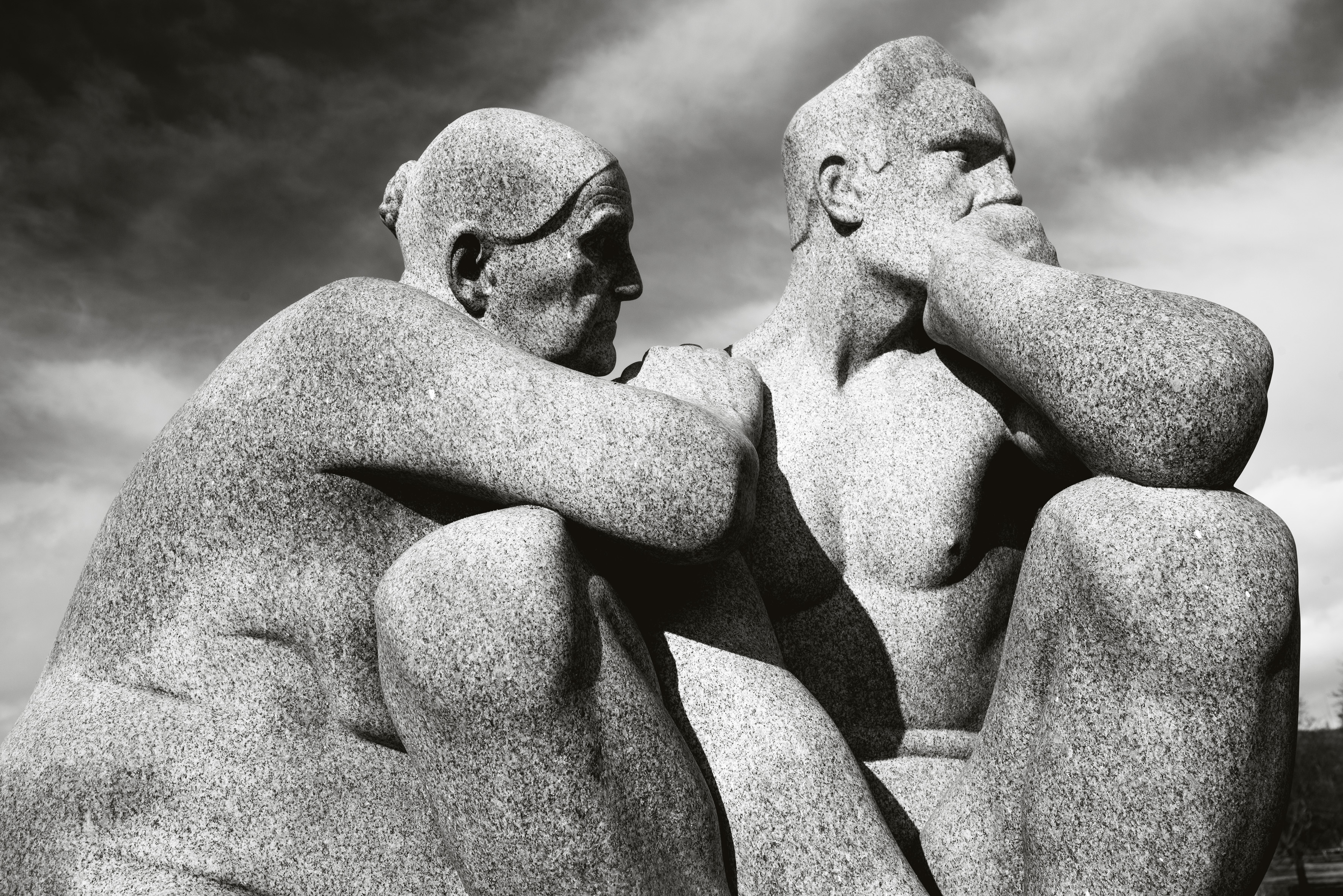 Oslo Norwegen Vigilant Park